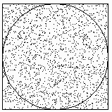 סימולציה של הטלת חצים לחישוב פאי